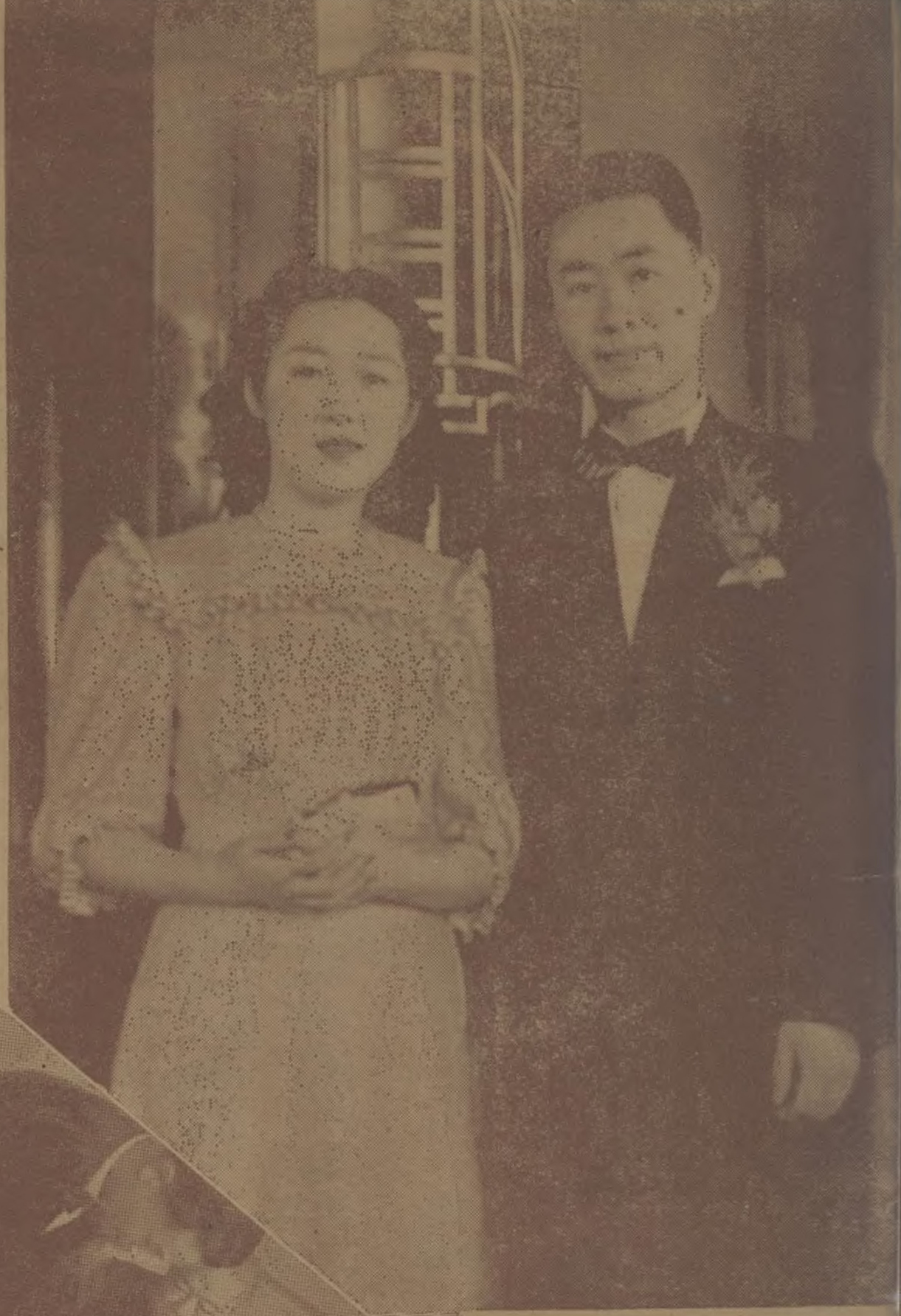 貝祖詒氏長公子與奚玉書氏之千金結婚